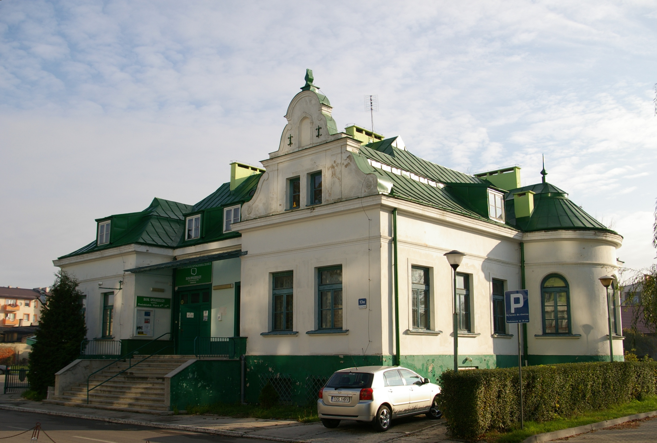 Pałacyk Rydla w Ostrowcu Świętokrzyskim, współcześnie siedziba Banku Spółdzielczego